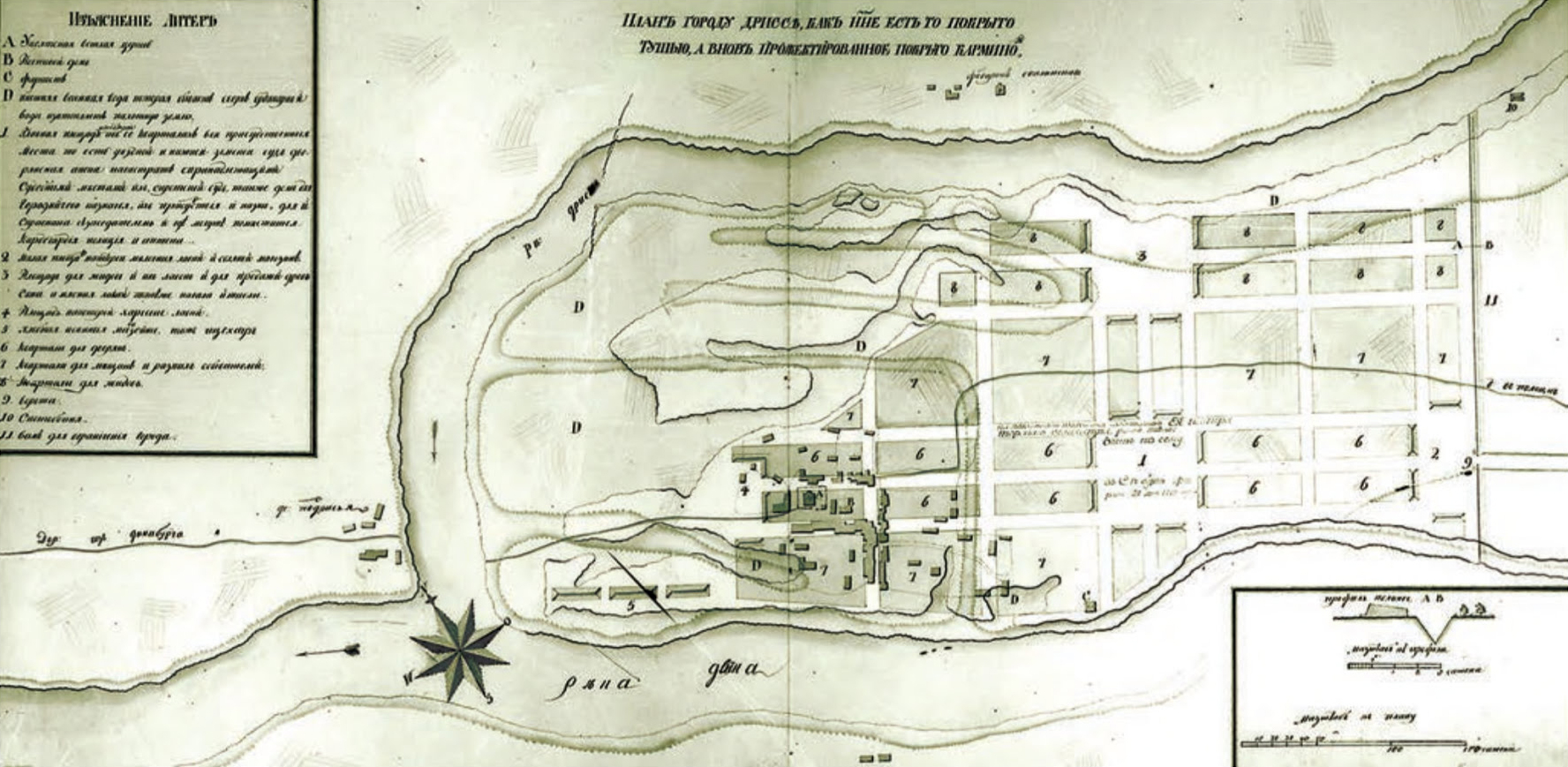 Беларуская (тарашкевіца): Дрыса (Drysa). Плян места, праект